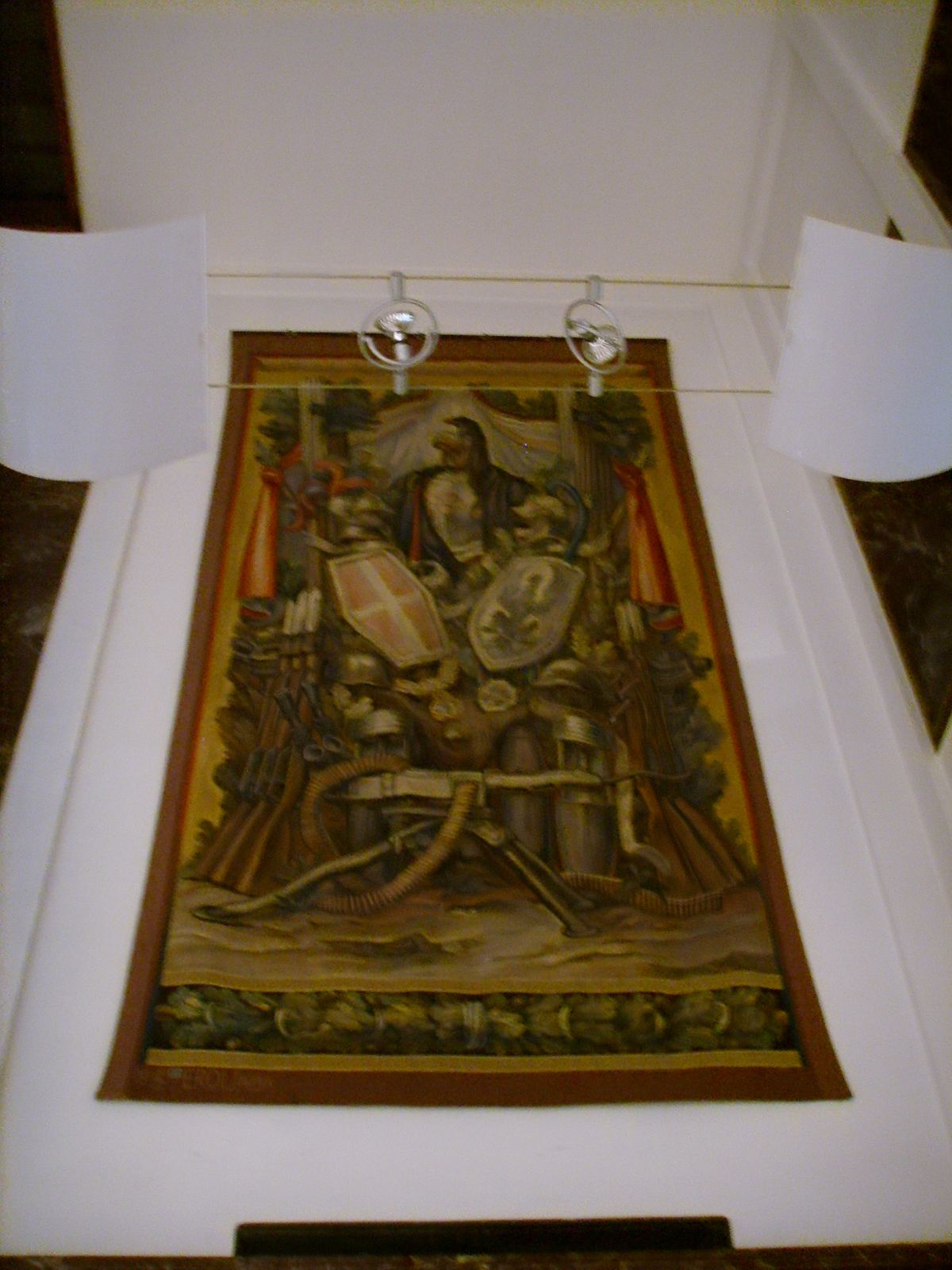 Palazzina reale, arazzo